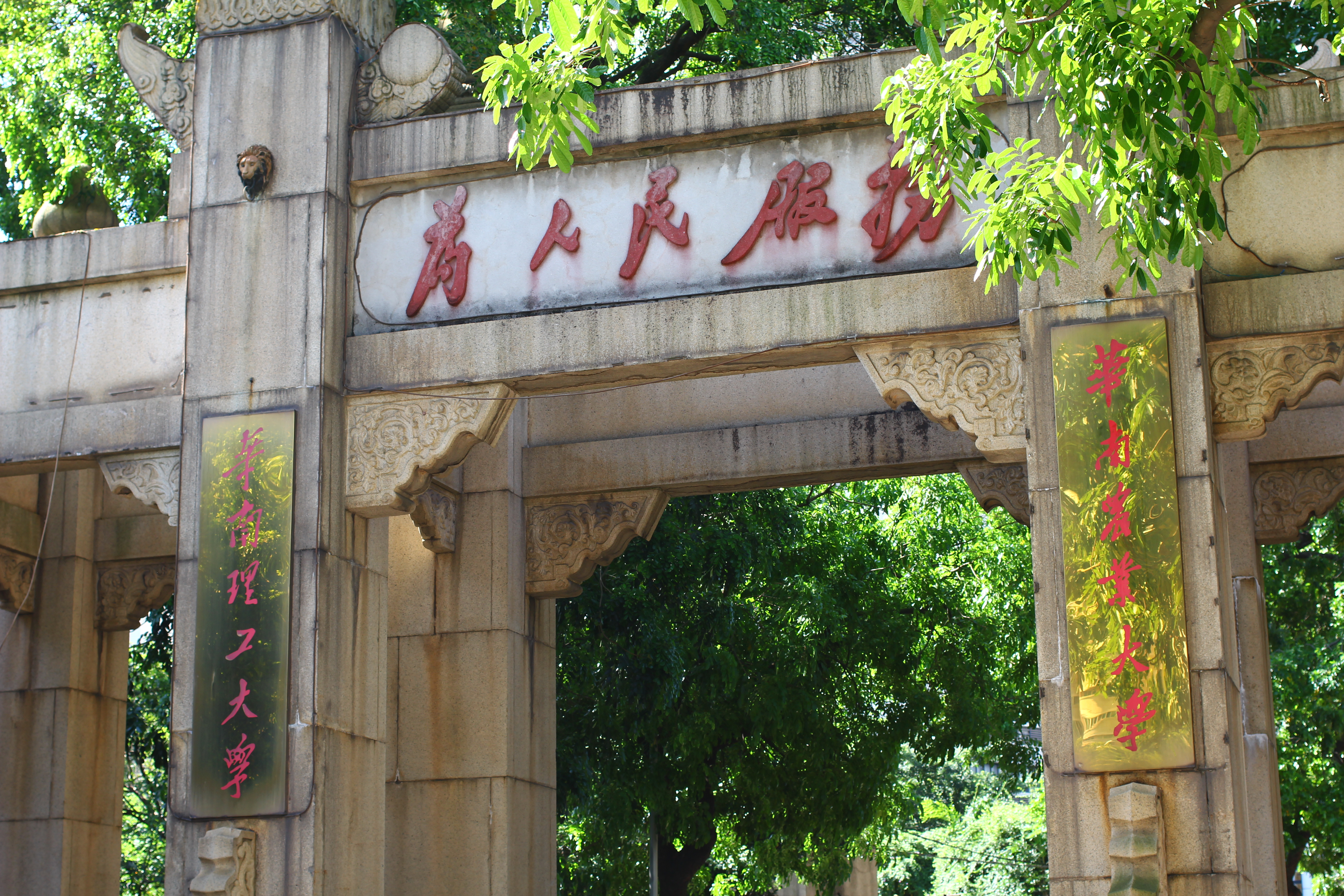 廣州市國立中山大學南門牌坊正面。文化大革命期間原由首任校長鄒魯題寫的「國立中山大學」被水泥板覆蓋，改成毛澤東的「為人民服務」。在2014年元月，水泥板已被移除。